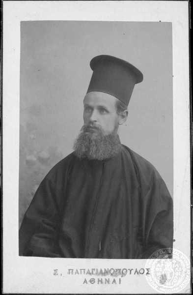 Константинос Иконому от Неред